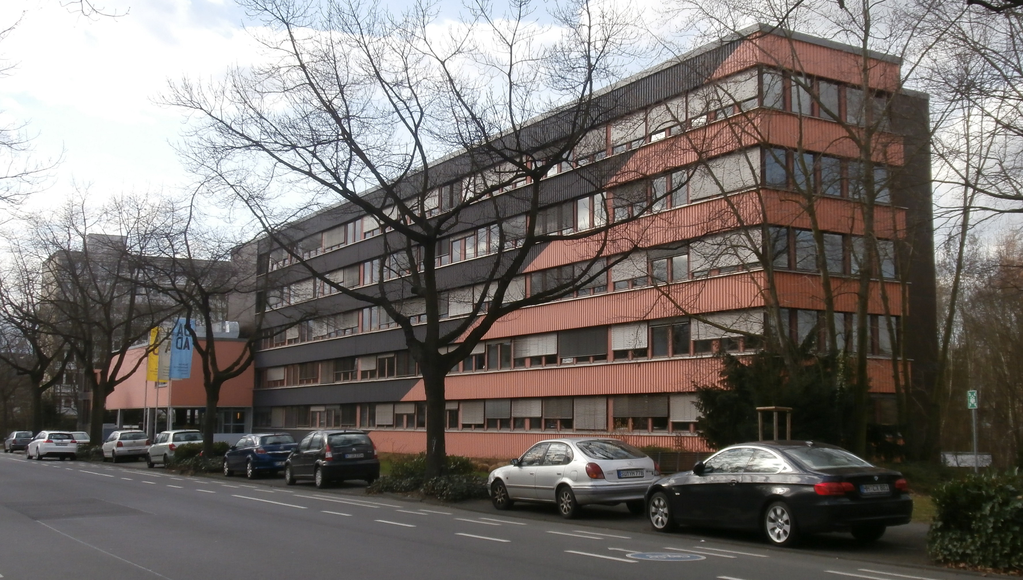 Deutscher Akademischer Austauschdienst, Kennedyallee 91–103, Hochkreuz, Bad Godesberg